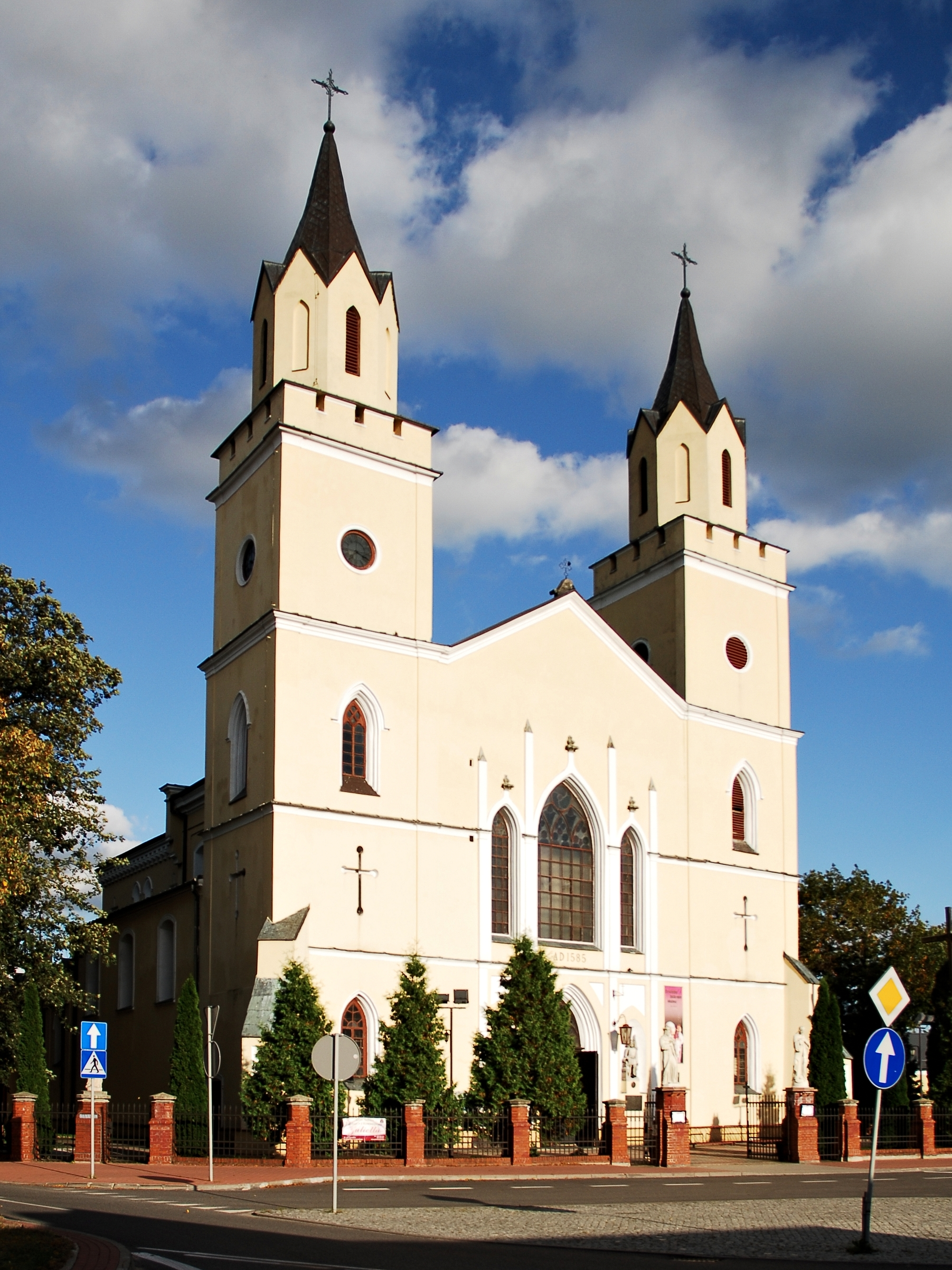 Kościół pw. Wszystkich Świętych i św. Stanisława w Wiskitkach.